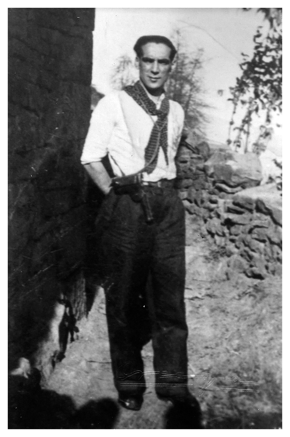 Comandante José Mata Castro, cuando estaba fugado en el monte entre el año 1939-48.